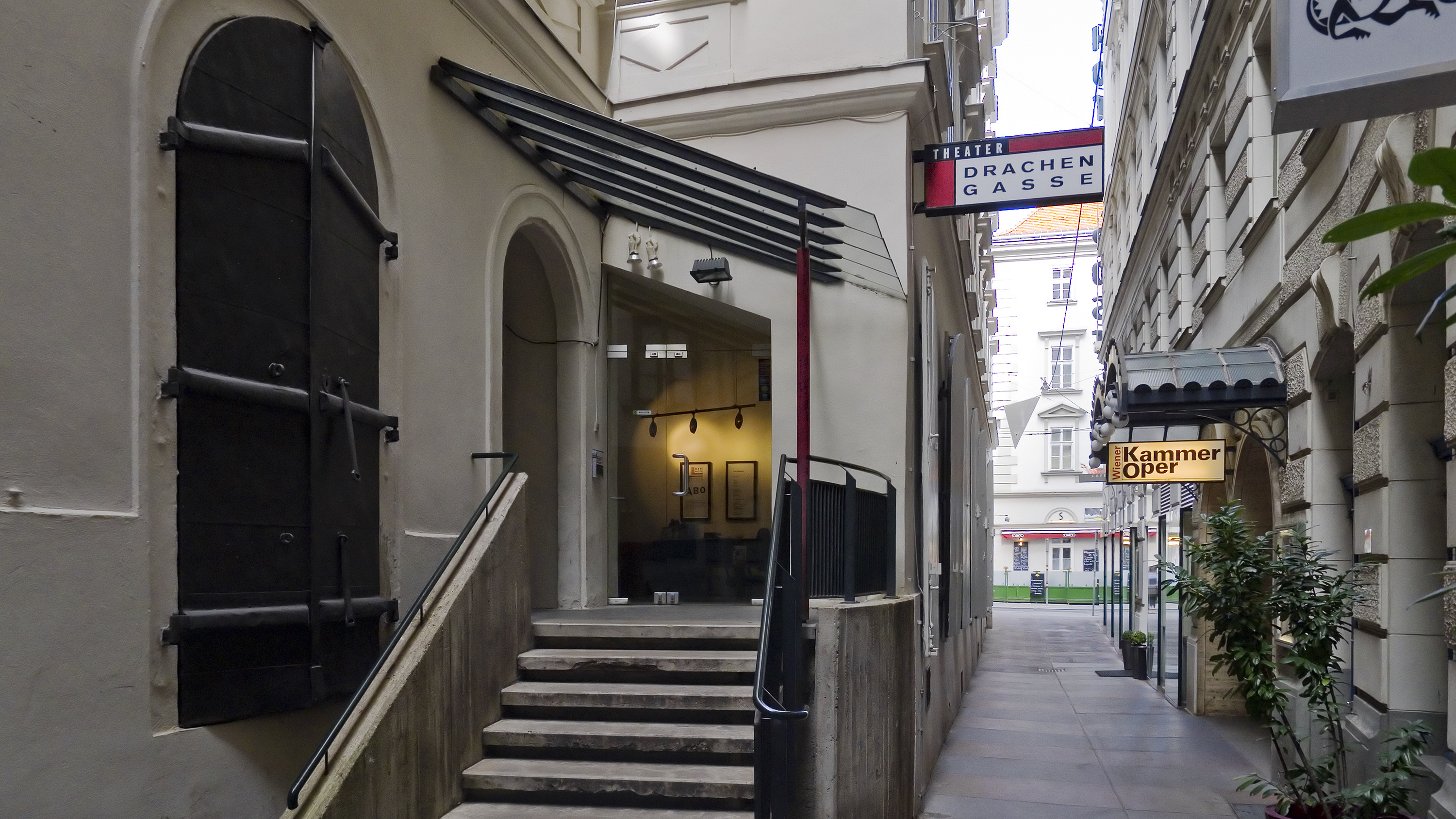 Theater Drachengasse in Wien 1